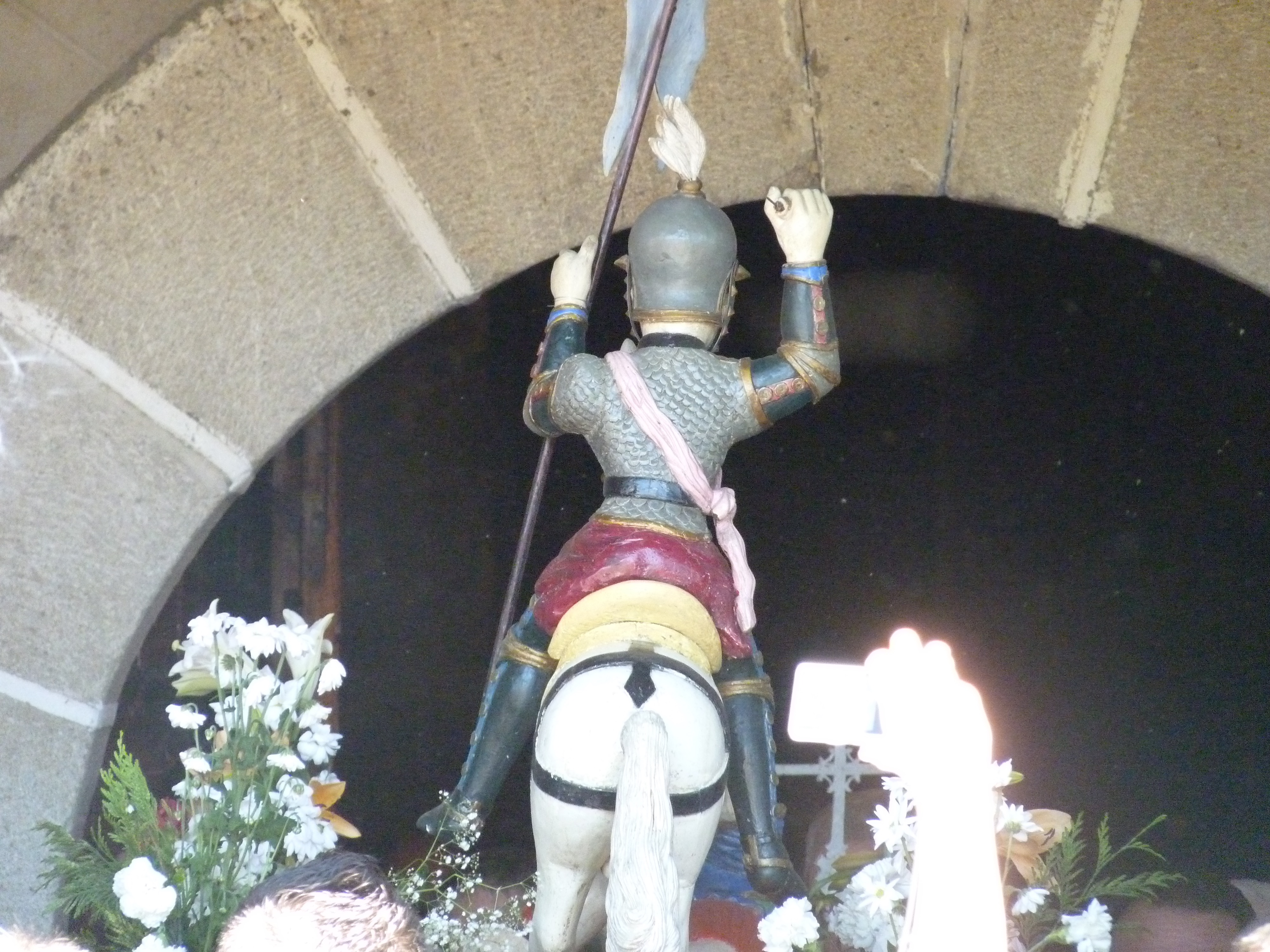 "metiendo el Santo"